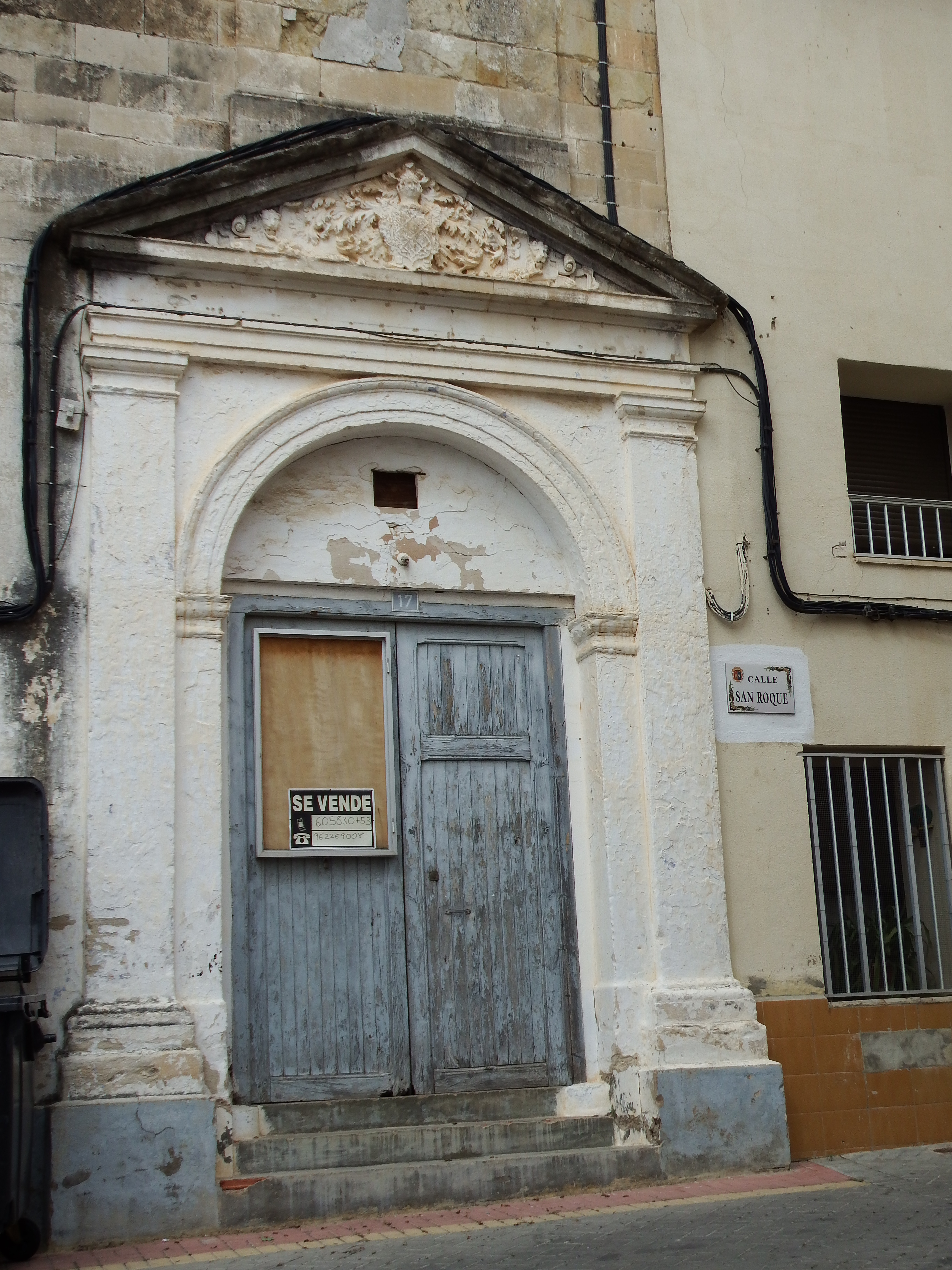 Imágenes diversas de Bicorp, La Canal de Navarrés